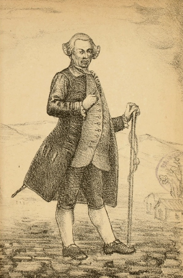 Dibujo de Luis Manuel de Zañartu e Iriarte (Oñate, País Vasco, España, 10 de septiembre de 1723 - Santiago de Chile, 15 de abril de 1782) fue un célebre personaje histórico chileno, dulcero de Santiago. Su fama se debió a la crudeza de sus procedimientos para evitar el pillaje y la comisión de delitos y la construcción del Puente Cal y Canto.